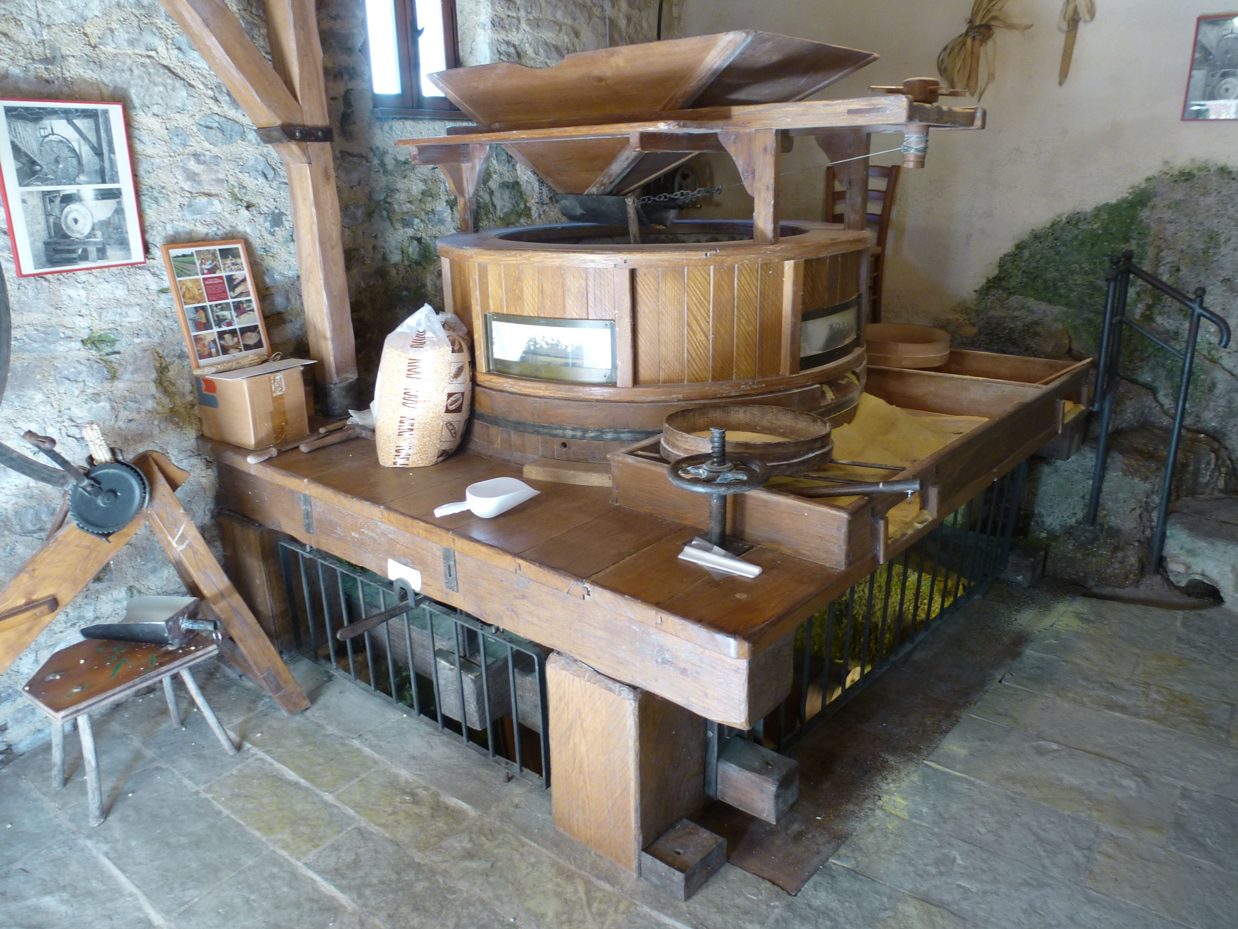 Mühle "Molinetto della Croda" aus dem 17. Jahrhundert in Refrontolo, Innenansicht